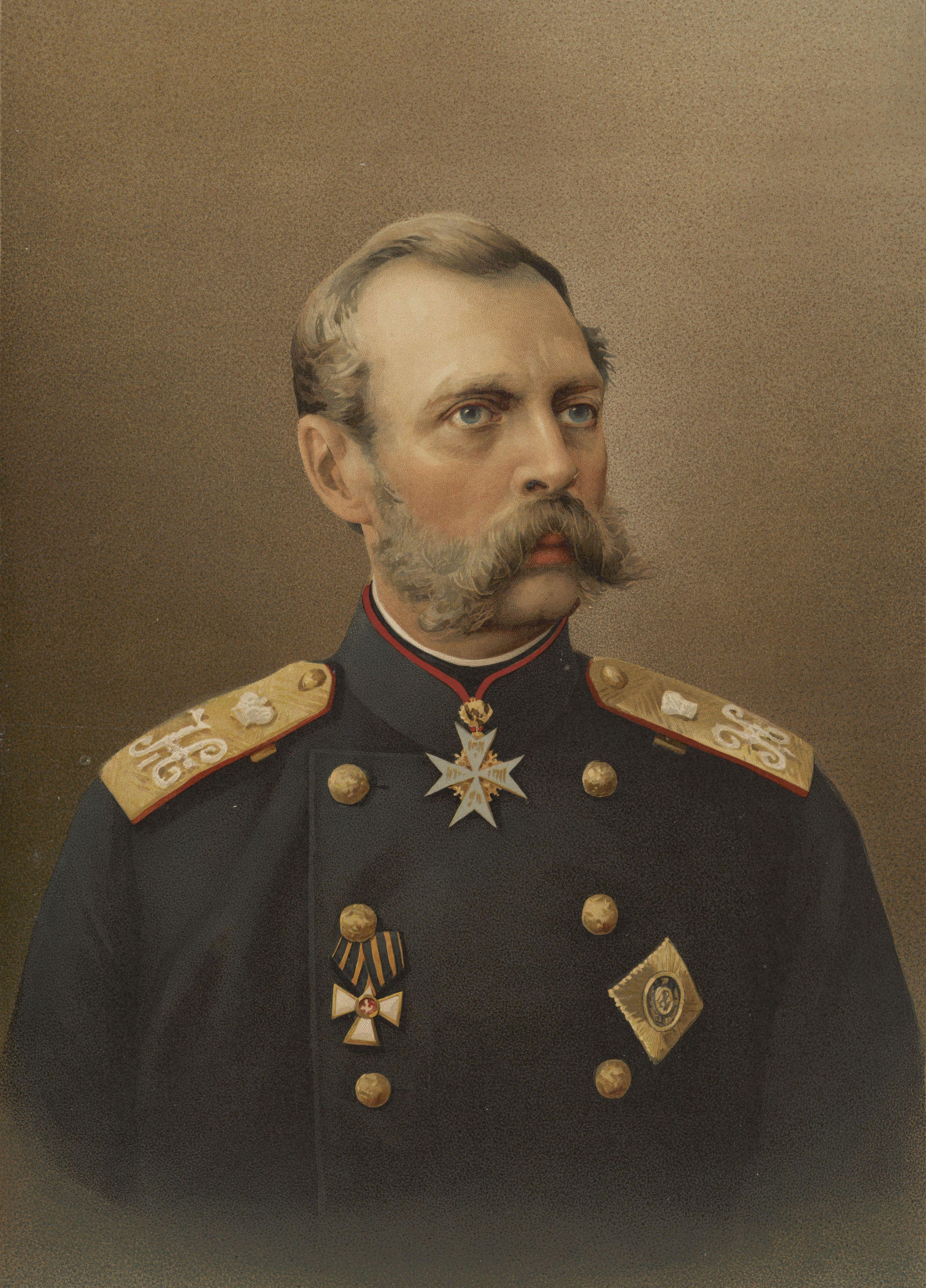 Alexander II Nikolayevich